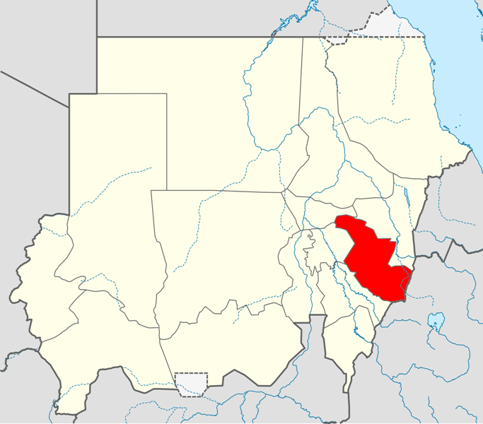 Locator map